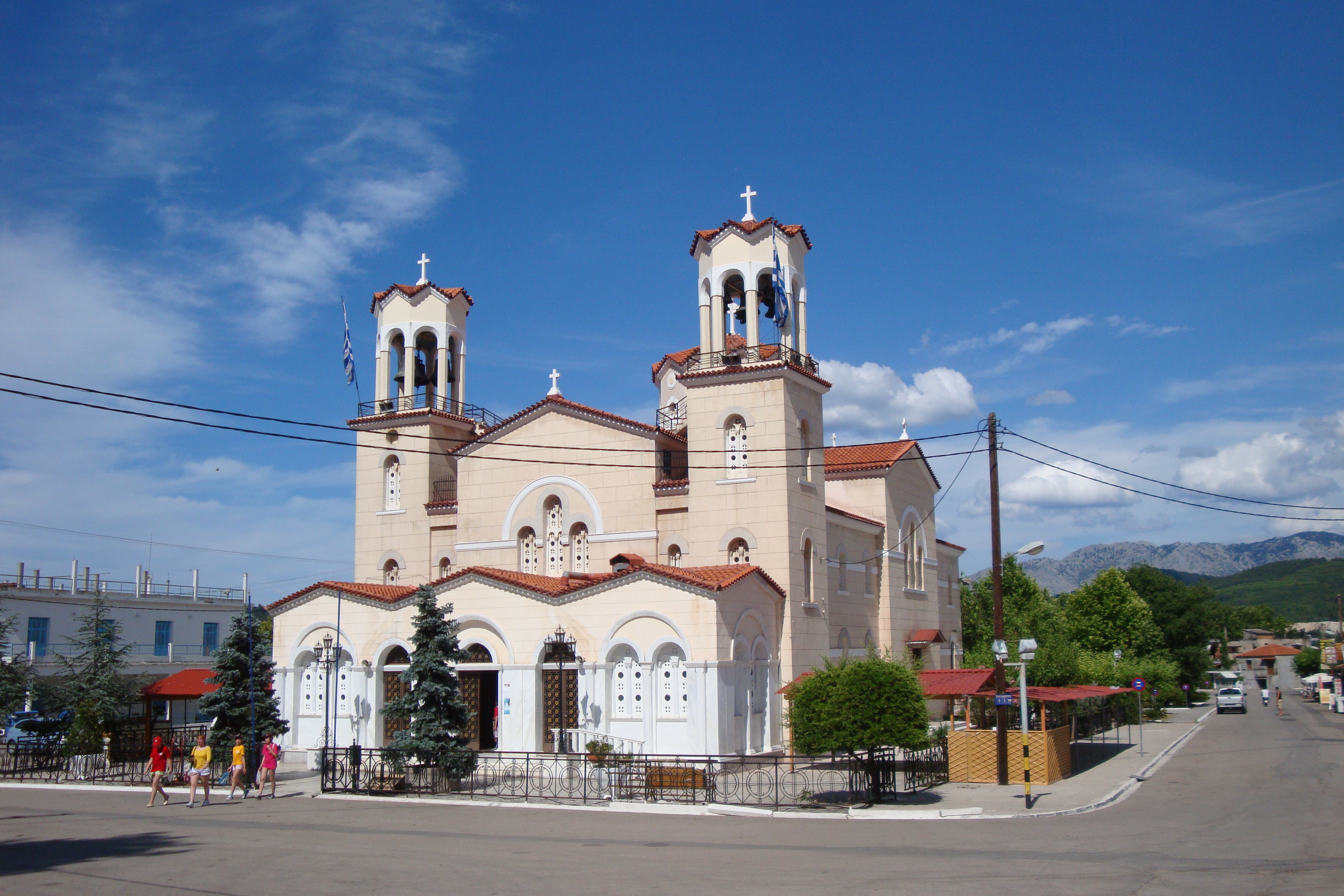 Monaster św. Jana Ruskiego w Prokopi